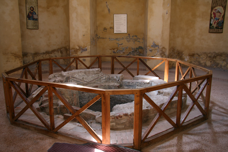 Interno del Battistero di San Giovanni ad Fontes a Lomello (PV) con i resti dell'antica fonte battesimale